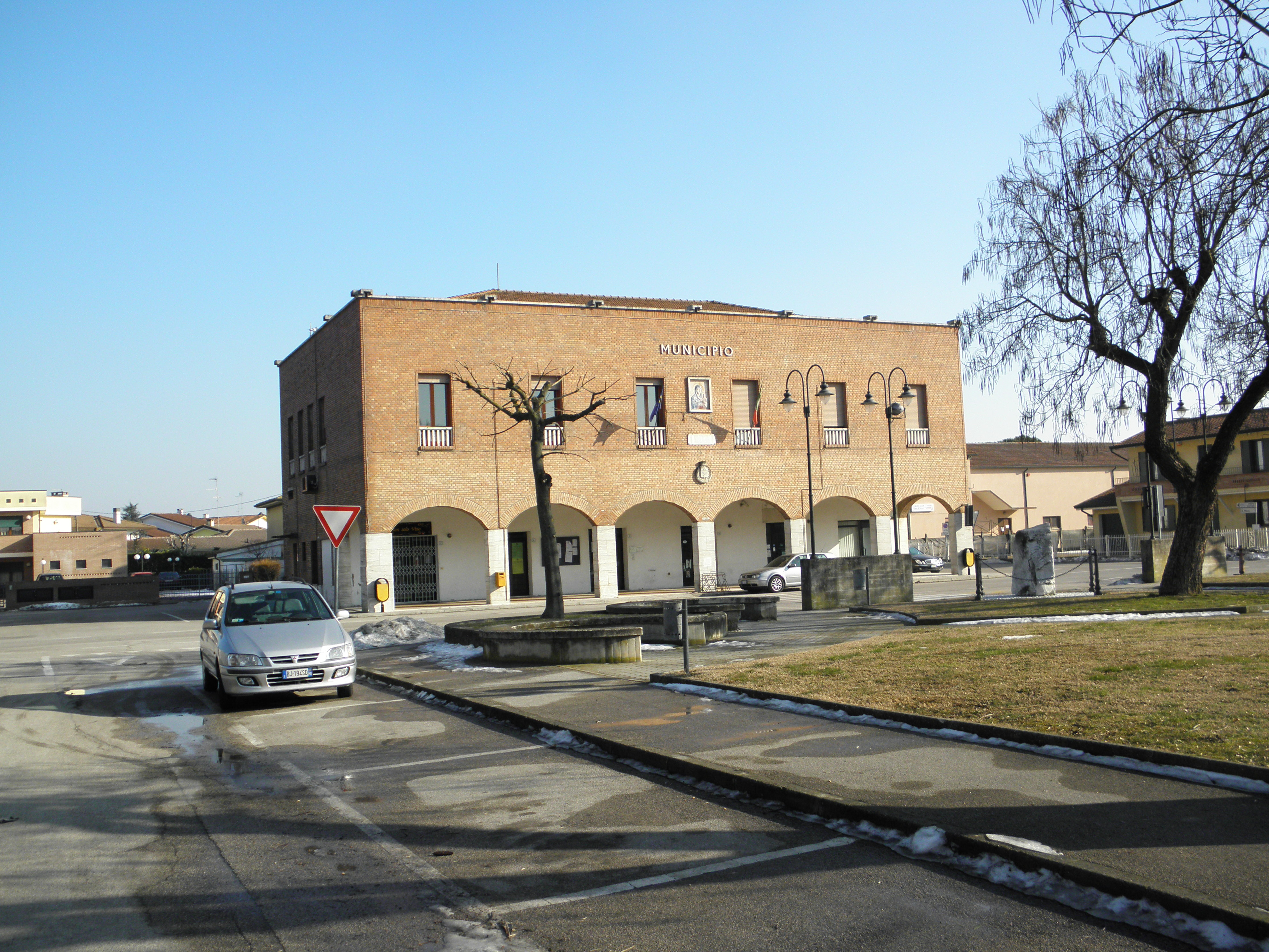 Bosaro, Piazza Madonna S.Luca: la palazzina municipale.